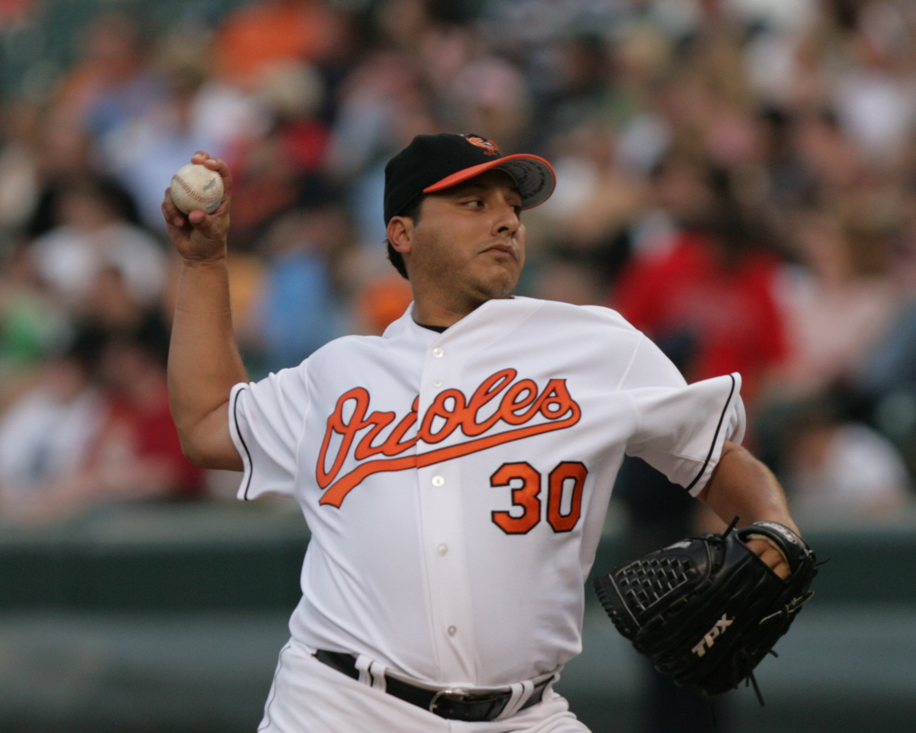 Russ Ortiz